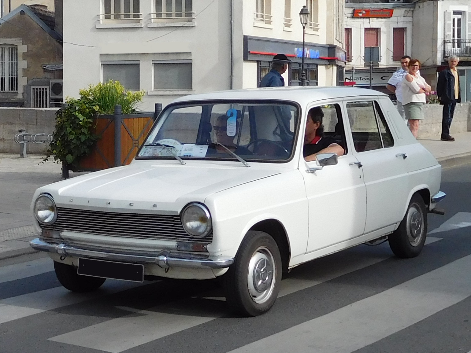 Simca 1100, blanche.